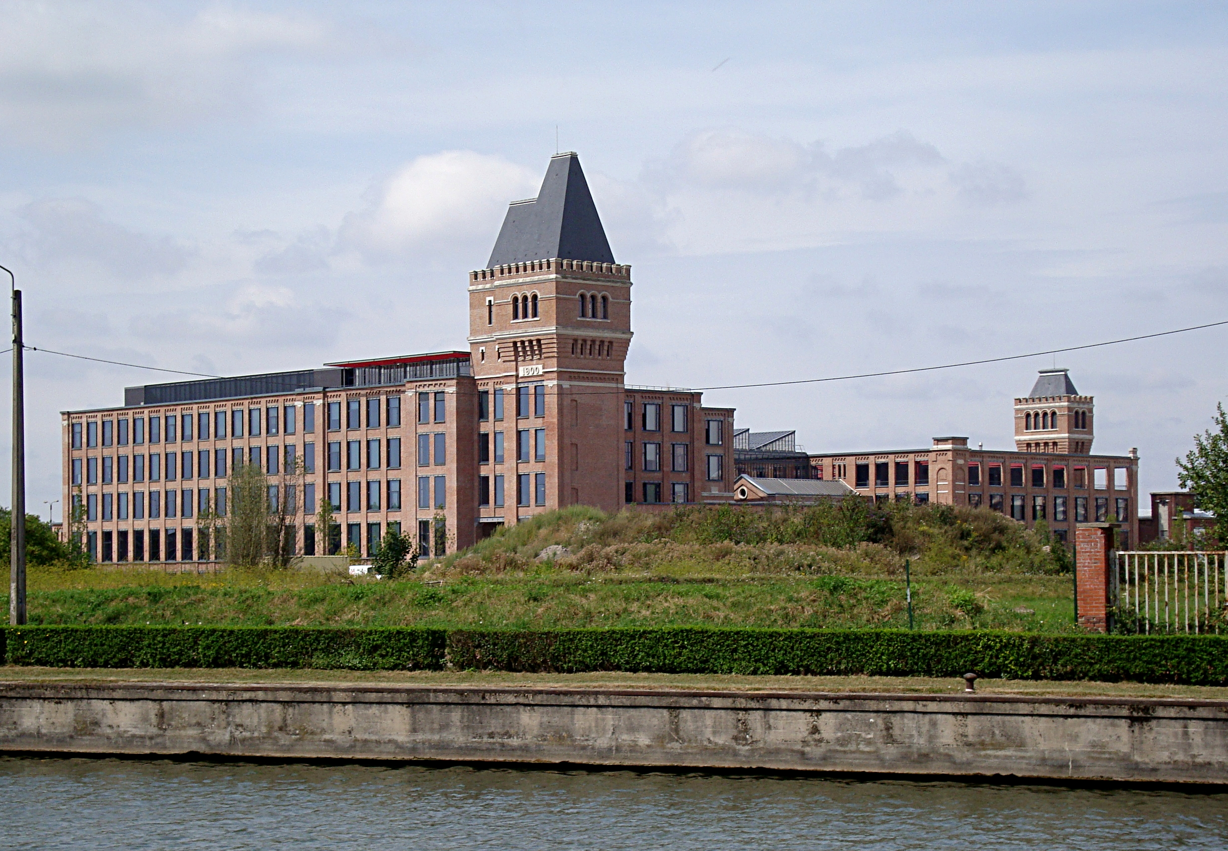 Le site Euratechnologies à Lille Lomme (Nord).